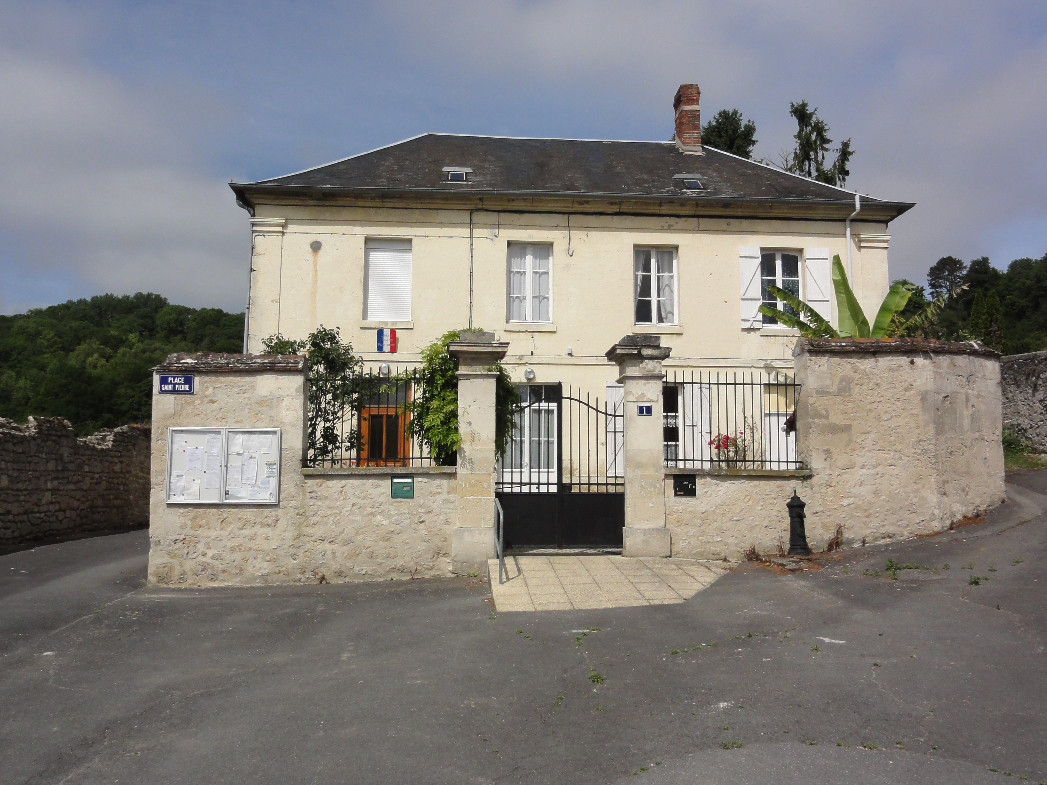 Jumigny (Aisne) mairie